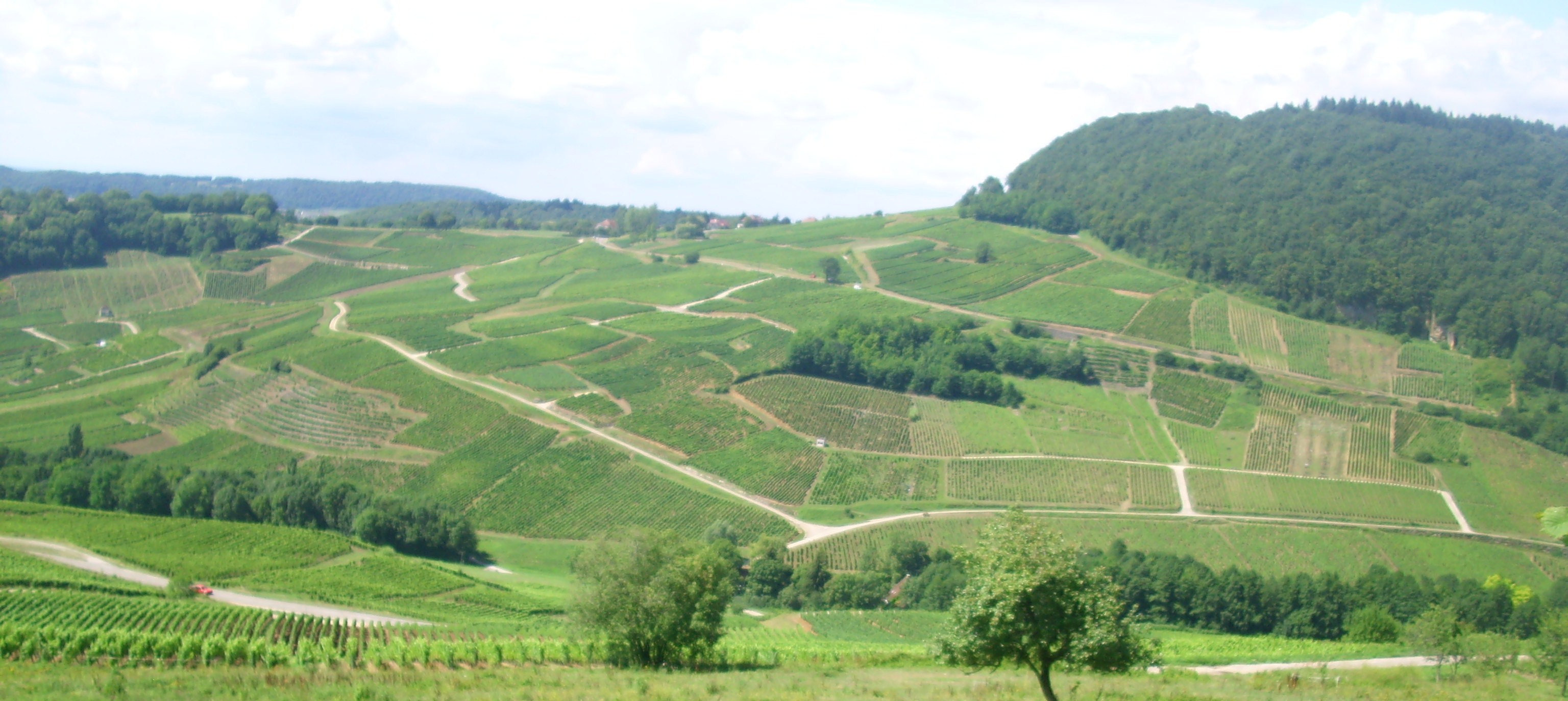 Vue d'une partie du vignoble de Chateau-Chalon (39)